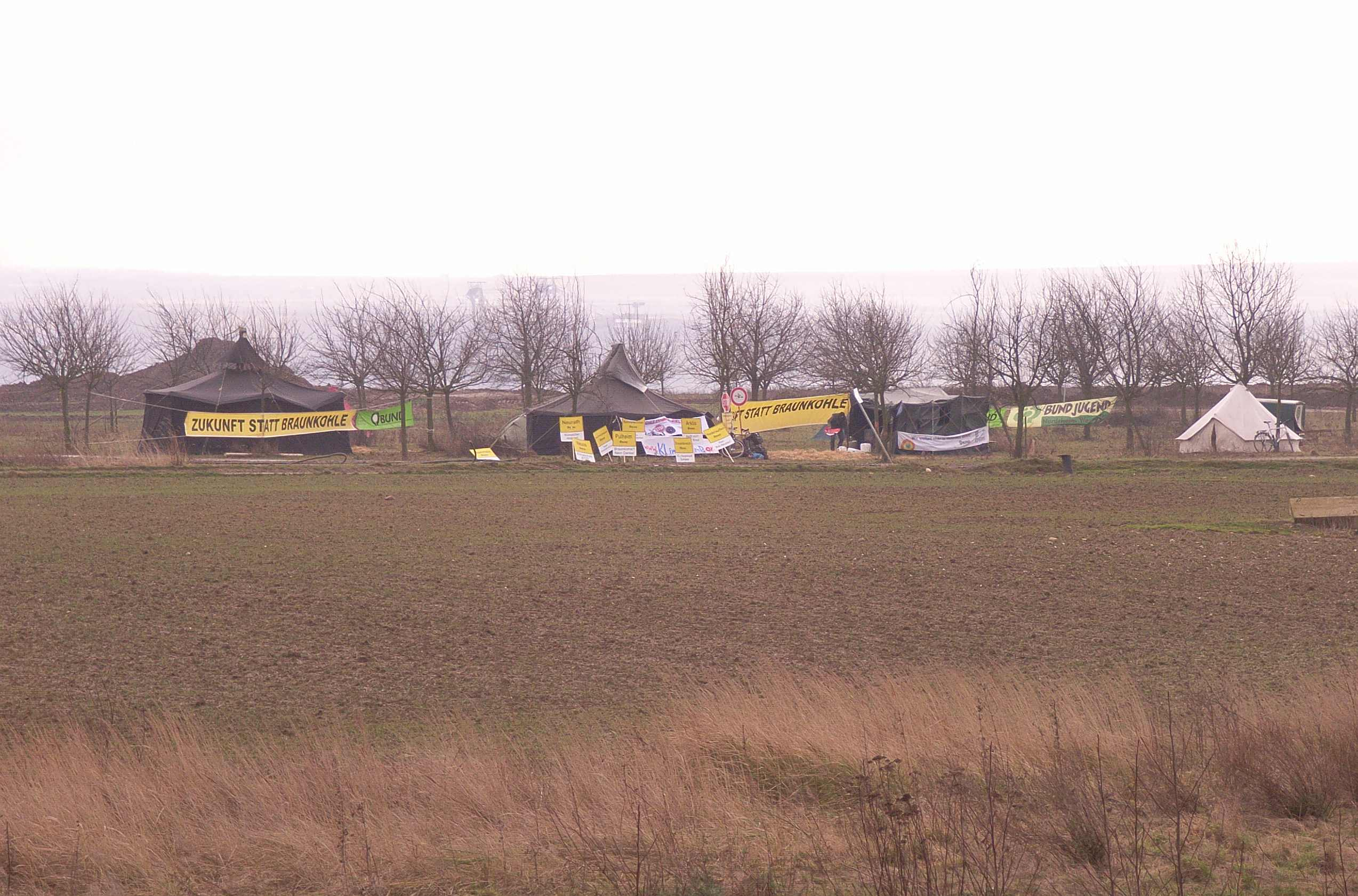 Zeltlager des BUND auf einer Obstwiese bei Otzenrath am Rand des Tagebaus Garzweiler, NRW